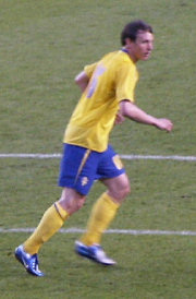 Kim Källström